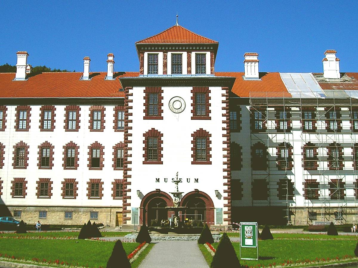 Hauptflügel von Schloss Elisabethenburg in Meiningen